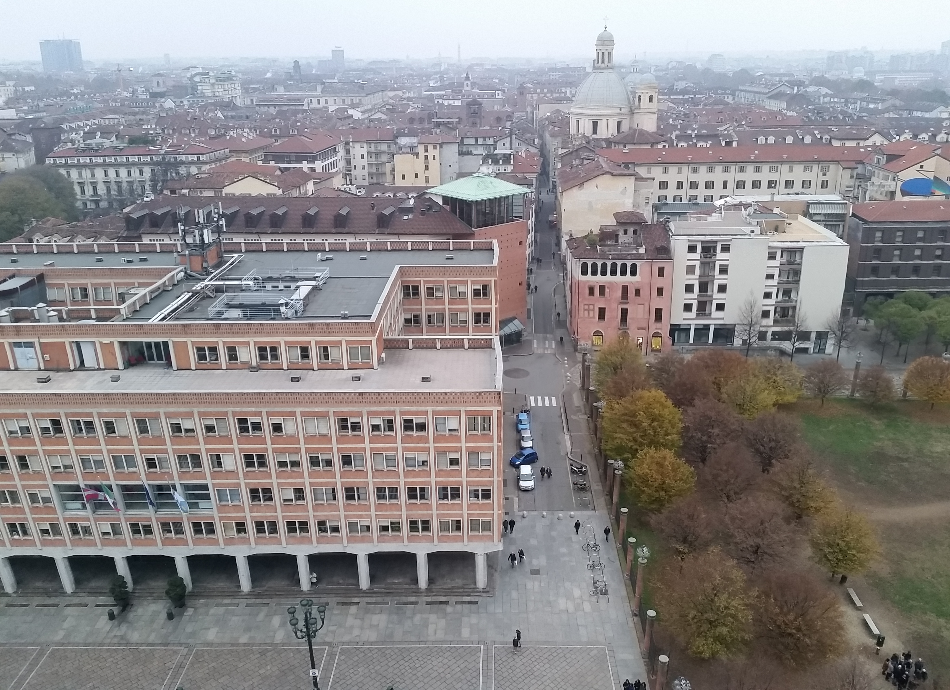 Vista lato ovest dal campanile del Duomo di Torino (Cattedrale di san Giovanni battista), con il "Palazzaccio" su Piazza San Giovanni e, in fondo a destra, la Basilica mauriziana.